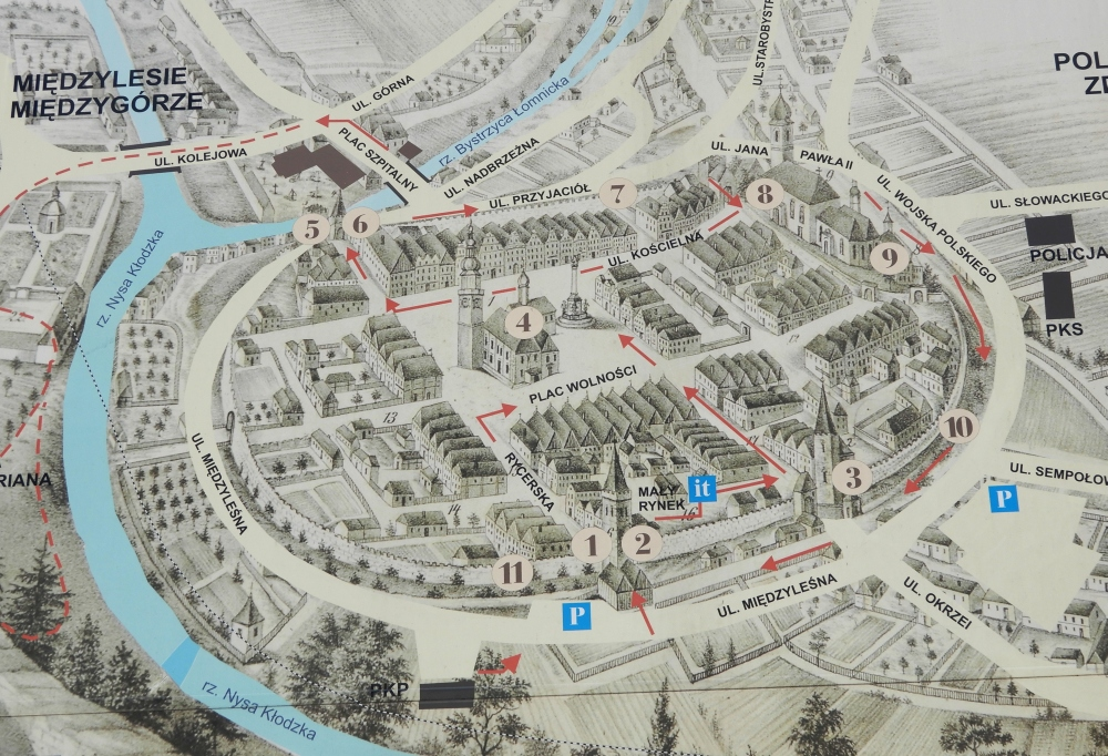 Bystrzyca Klodzka - plán historických památek Starého Města